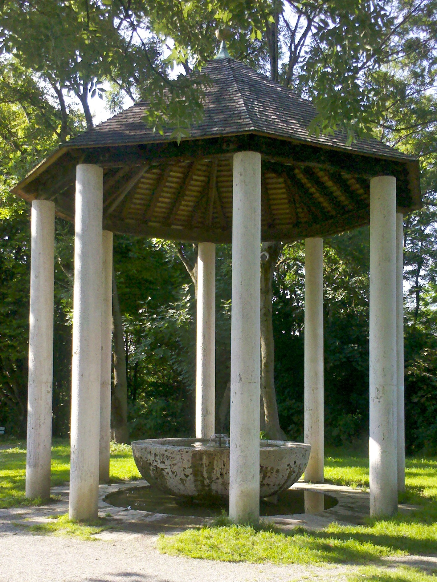 Rundpavillon auf dem Neuhofener Berg in München.